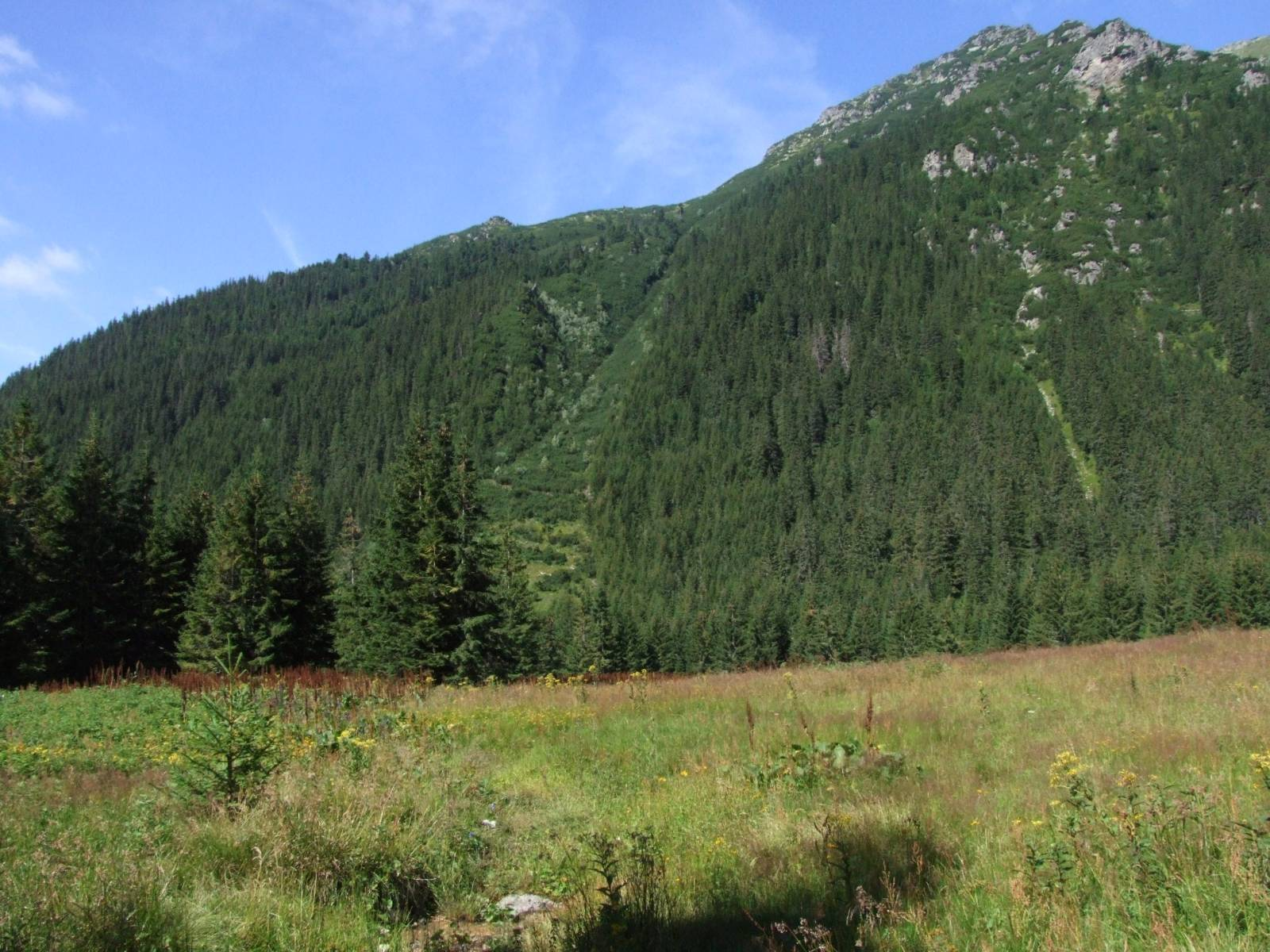 Niznie Otargańce, widok z doliny Raczkowej